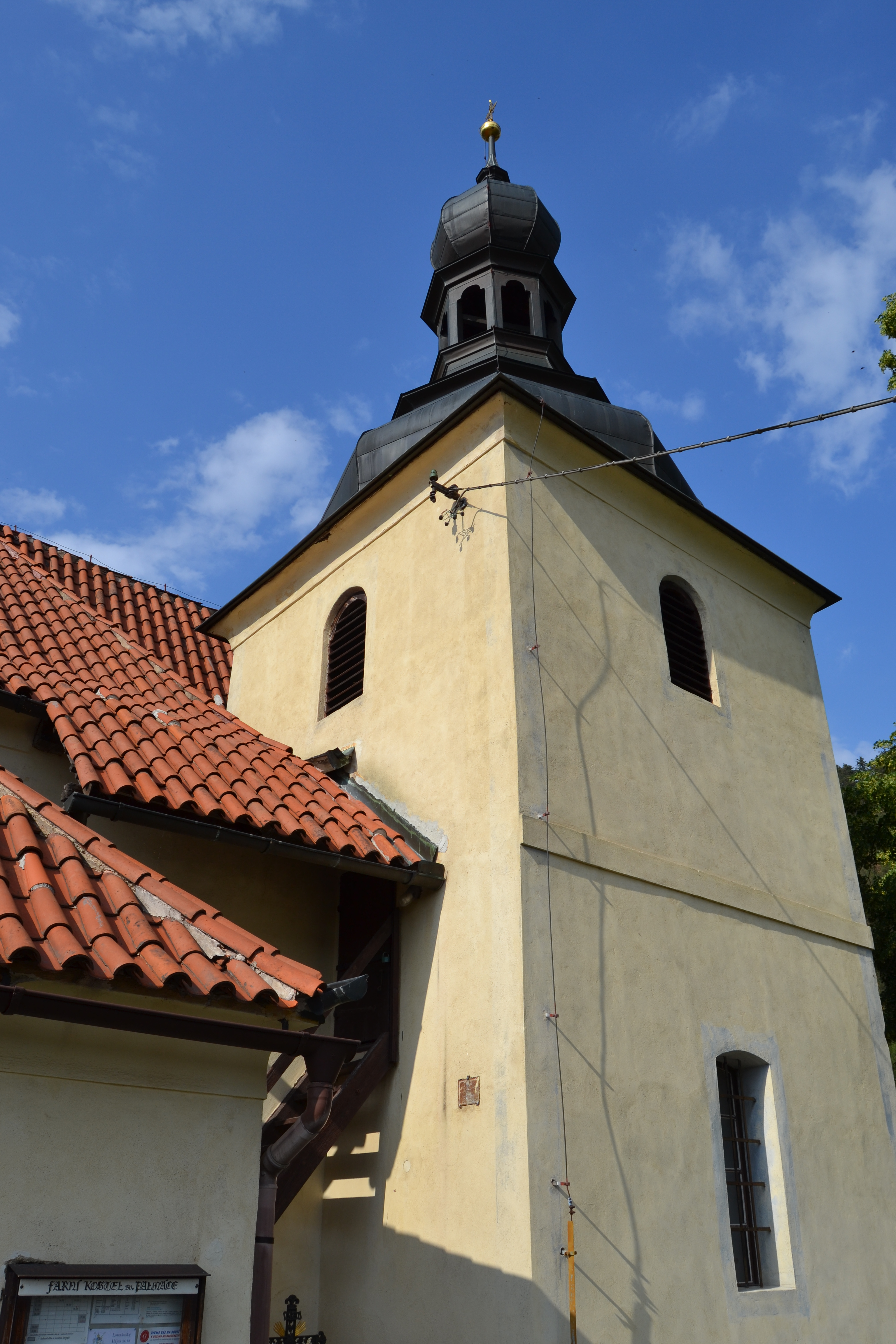 věž kostela sv. Palmácia